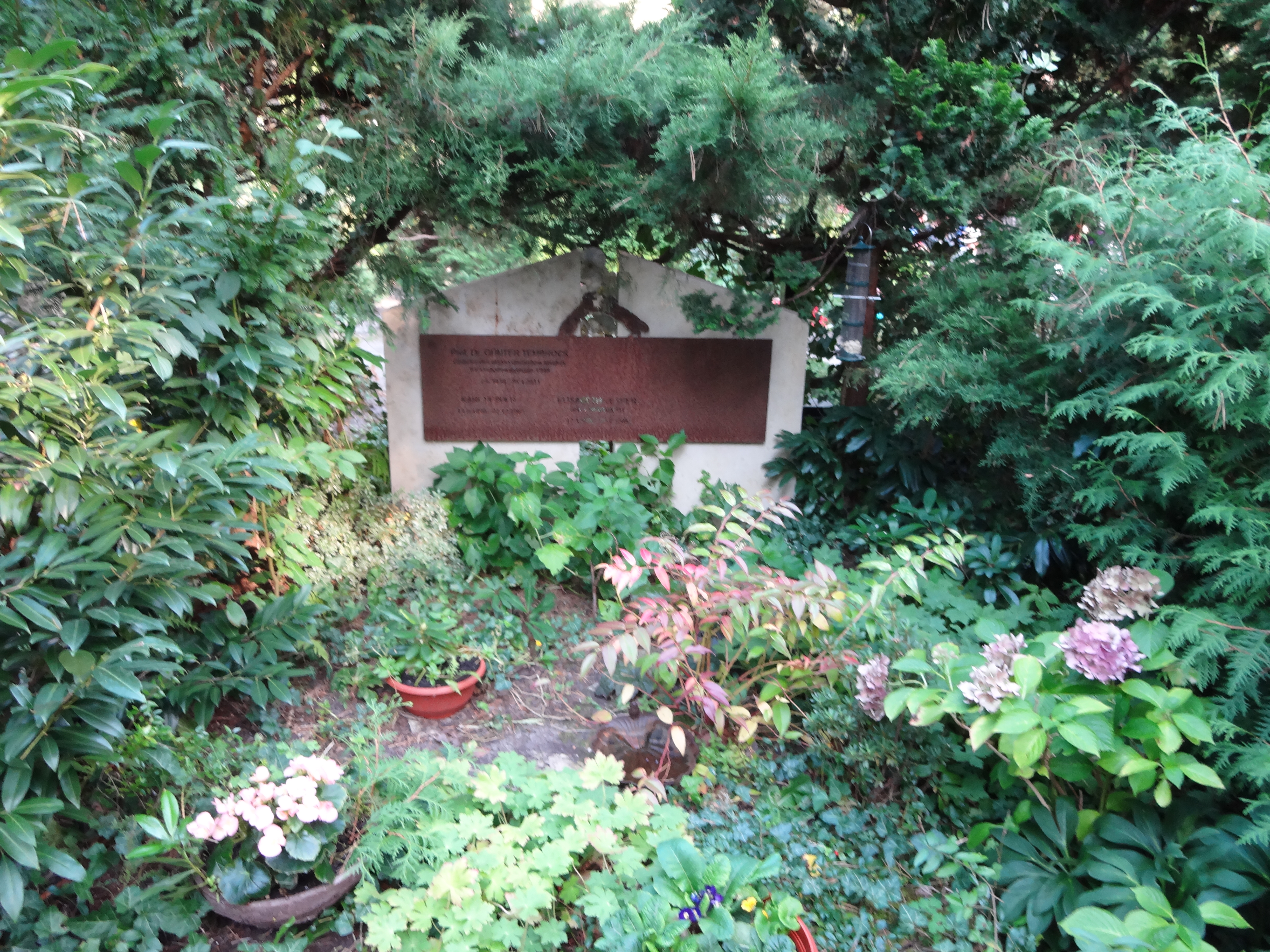 Grab von Prof. Günter Tembrock auf dem Waldfriedhof Dahlem